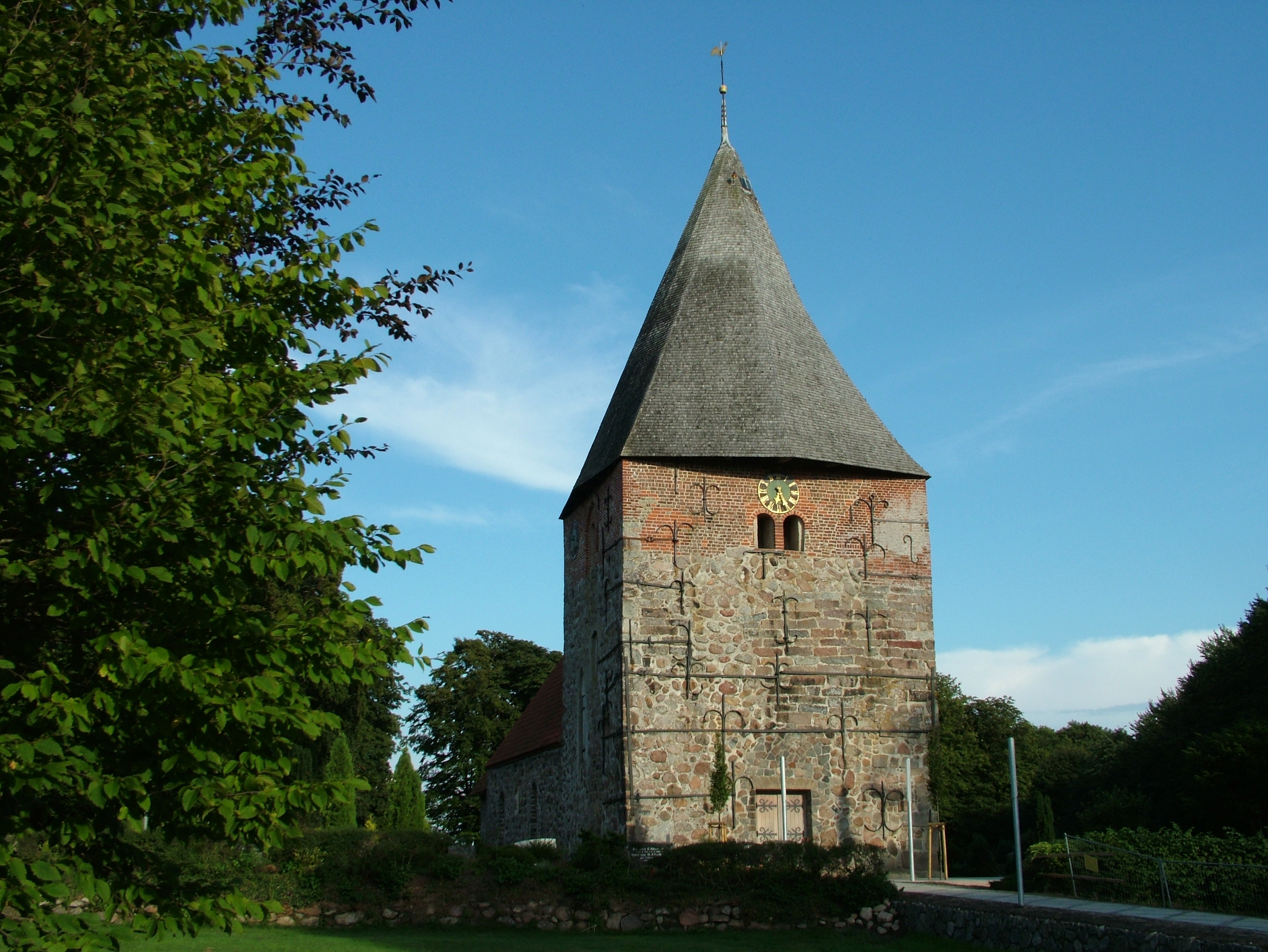 Schwesing, Schleswig-Holstein, Kirche, um 1200 erbaut